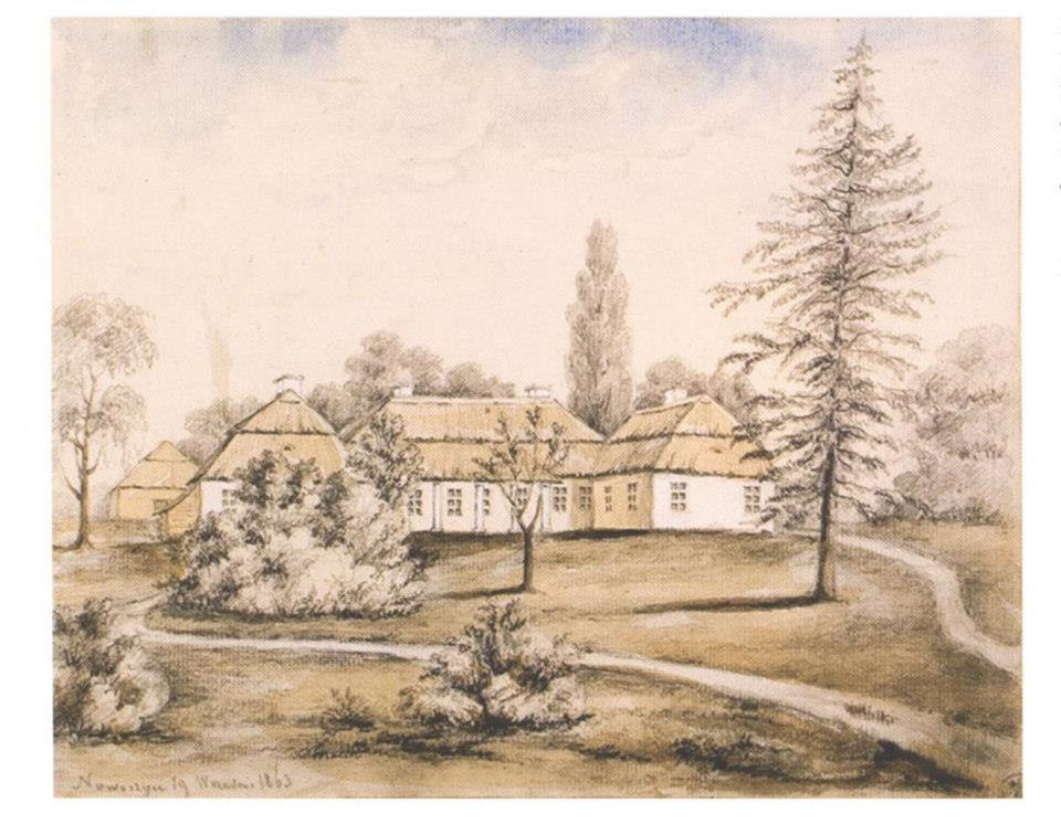 Беларуская (тарашкевіца): Навашыцы (Navašyčy), сядзіба Гедройцаў (Giedrojc)